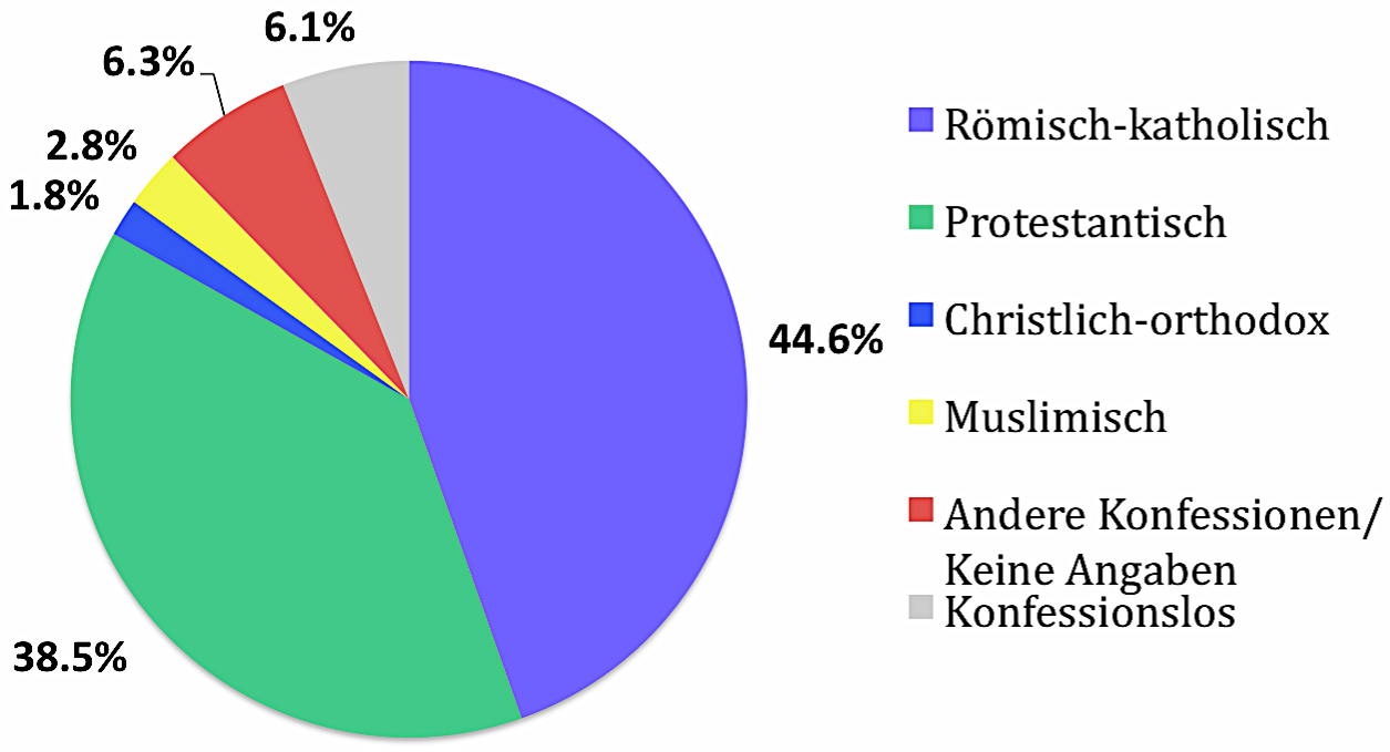 Konfessionsbild der Stadt Chur